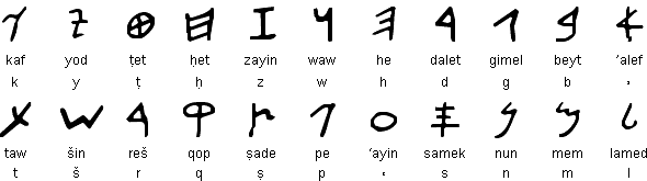 палео иврит